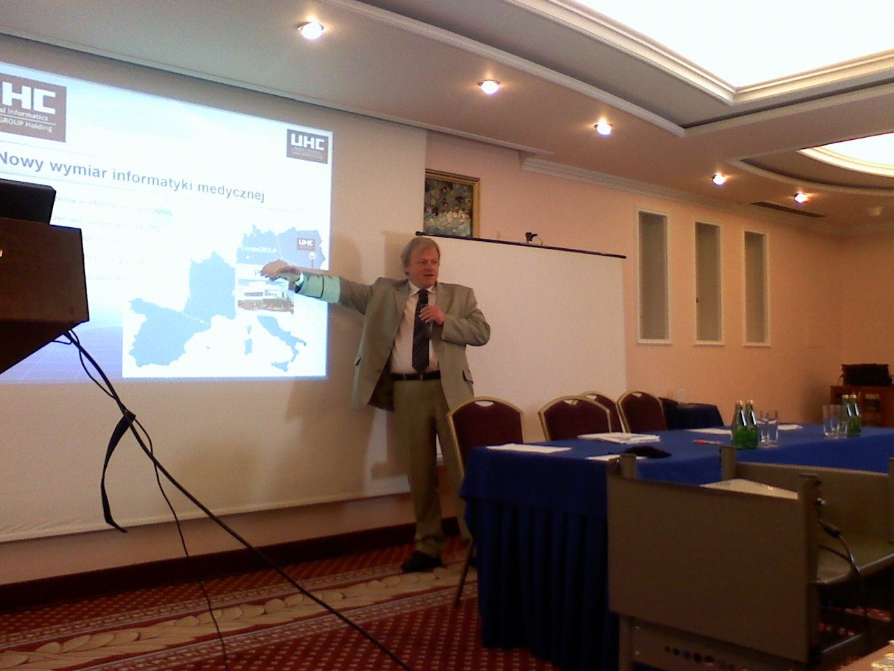 Dr Jacek Grabowski, twórca systemu jednorodnych grup pacjentów